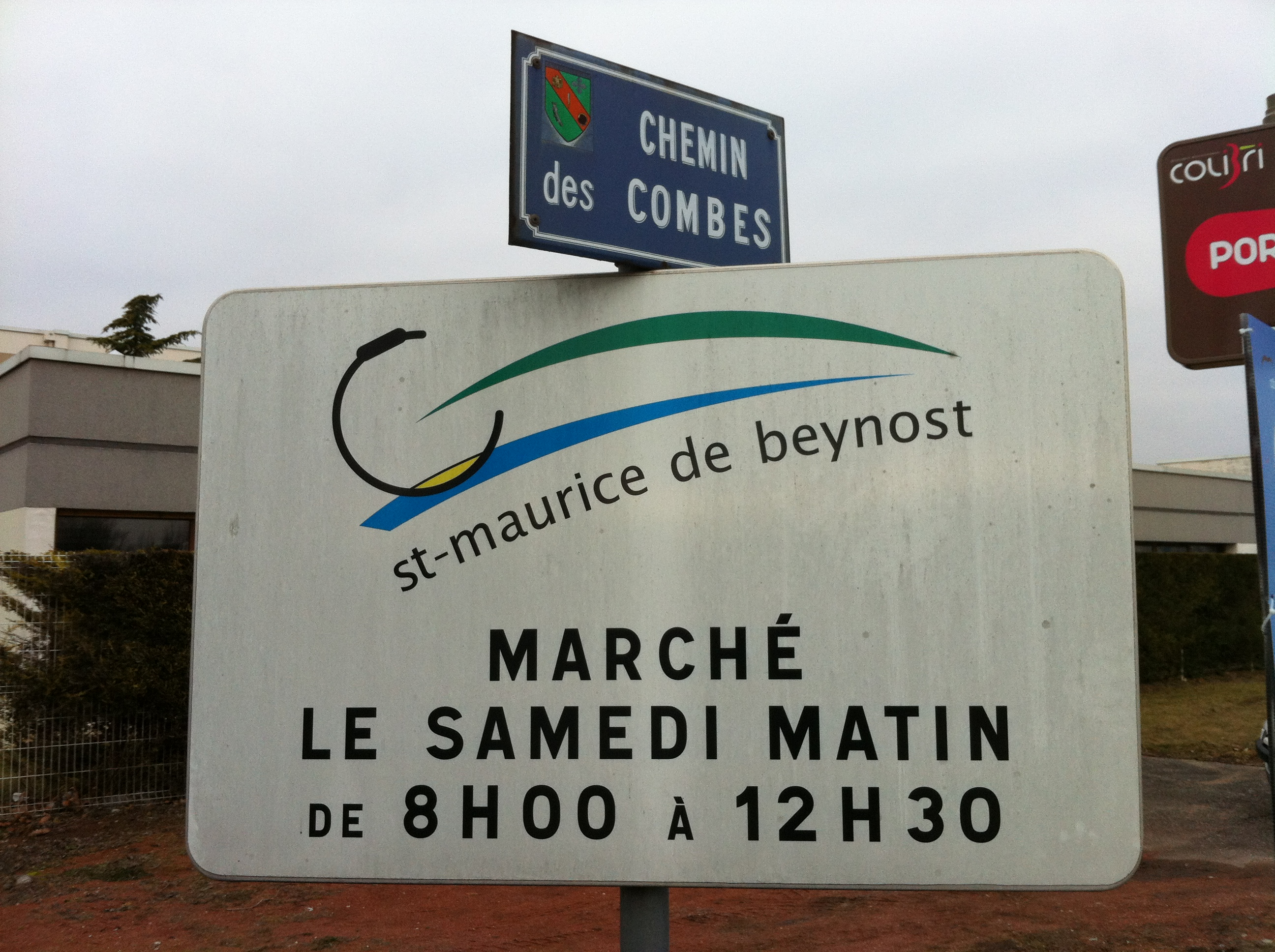 Panneau marché de Saint-Maurice-de-Beynost.